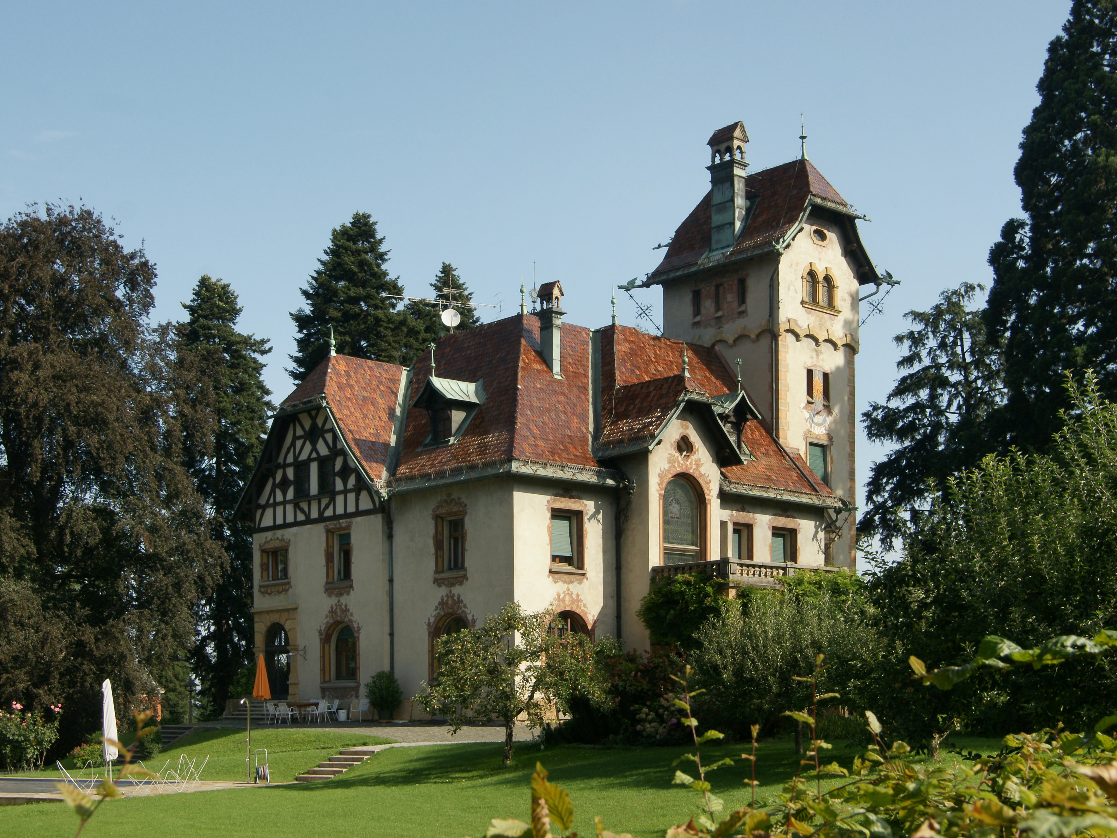 aus dem DEHIO Vorarlberg 1983: Dr.-Waibel-Strasse Nr.14: Villa, erbaut 1890/92 von Architekt Julius Rhomberg und dem Baumeister J.A.Albrich. Mehrgliedriger Bau mit Schopfwalmdach, angehängten Bauteilen; Erker mit Zwiebelhelm, Terasse, bergfriedartiger Turm mit Krüppelwalmdach (oberster Teil vorkragend auf Arkaden); Lüftlmalerei; Park mit originaler Einfriedung (Toreinfahrt in Art eines Treppengiebels (originaler Zaun, bezeichnet 1892). In Dornbirn, Oberdorf. Dr. Renate Madritsch, Landeskonservatoriat für Vorarlberg Dornbirn, Dr. Waibelstraße 14; Die zu den Fabriken gehörigen Fabrikantenvillen in der Dr.-Waibel-Straße in Dornbirn bestechen durch ihre eklektische für die Bauzeit typische Gestaltung und ihre Lage inmitten großzügig angelegter Parks mit exotischem Baumbestand. Die Villa Guntram Hämmerle (1862-1923), jüngster Sohn des Firmengründers F.M. Hämmerle wurde 1890 bis 92 von den Architekten Julius Rhomberg und J.A. Albrich im feudalen sogenannten altdeutschen Stil mit zahlreichen Zitaten aus der deutschen Renaissance, erbaut. Zu den Textilwerken Hämmerle gehörten die Weberei Dornbirn Weppach, die Färberei in Dornbirn Steinebach und die Spinnerei Gütle. Später kamen die Spinnerei Feldkirch Gisingen, die Webereien Dornbirn Sägen und Eulental hinzu (heute Eleonore Rhomberg). Diese Villa wird noch von den Nachfahren des Firmengründers bewohnt.